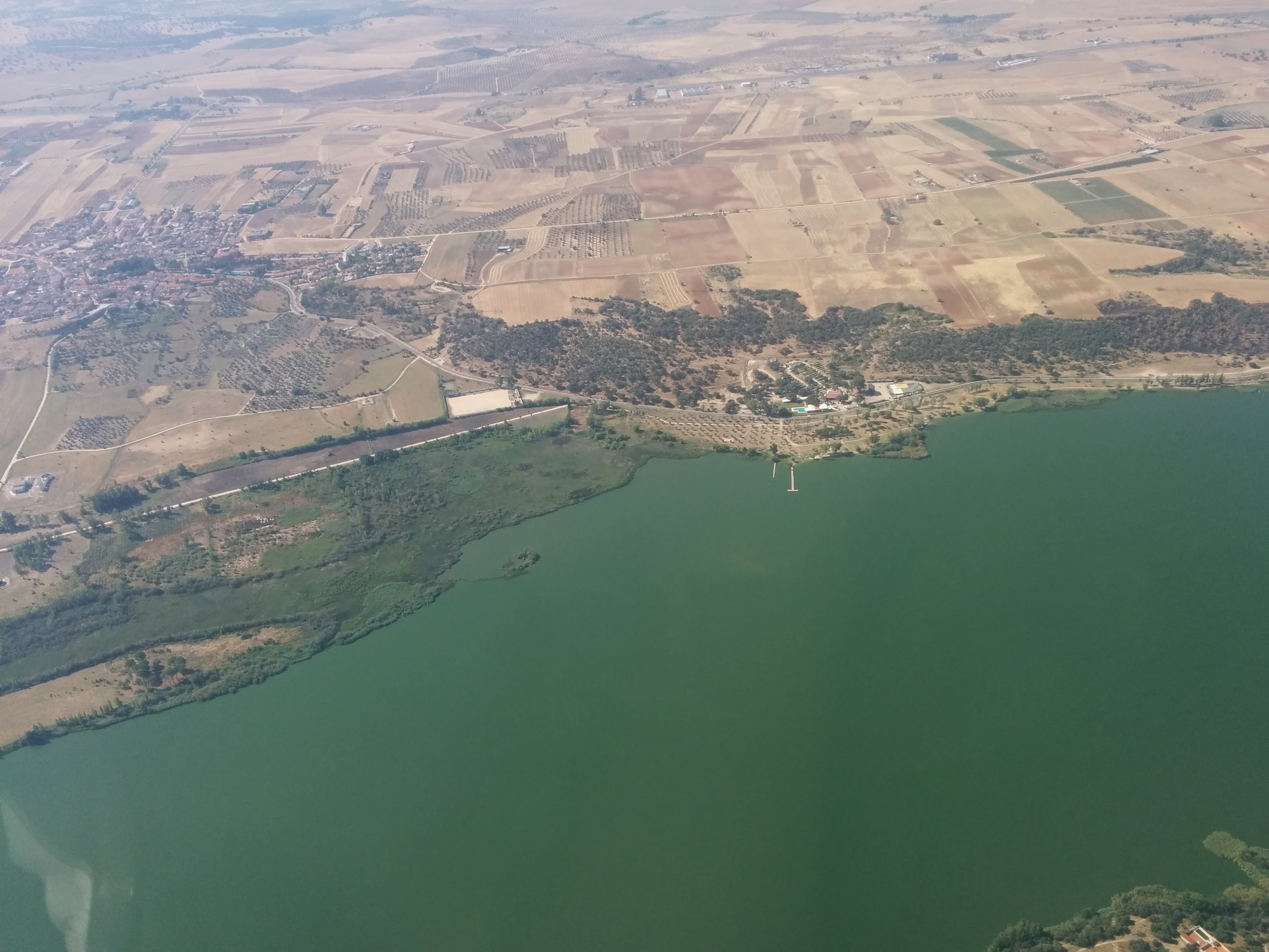 Vista aerea Embalse Cazalegas 4